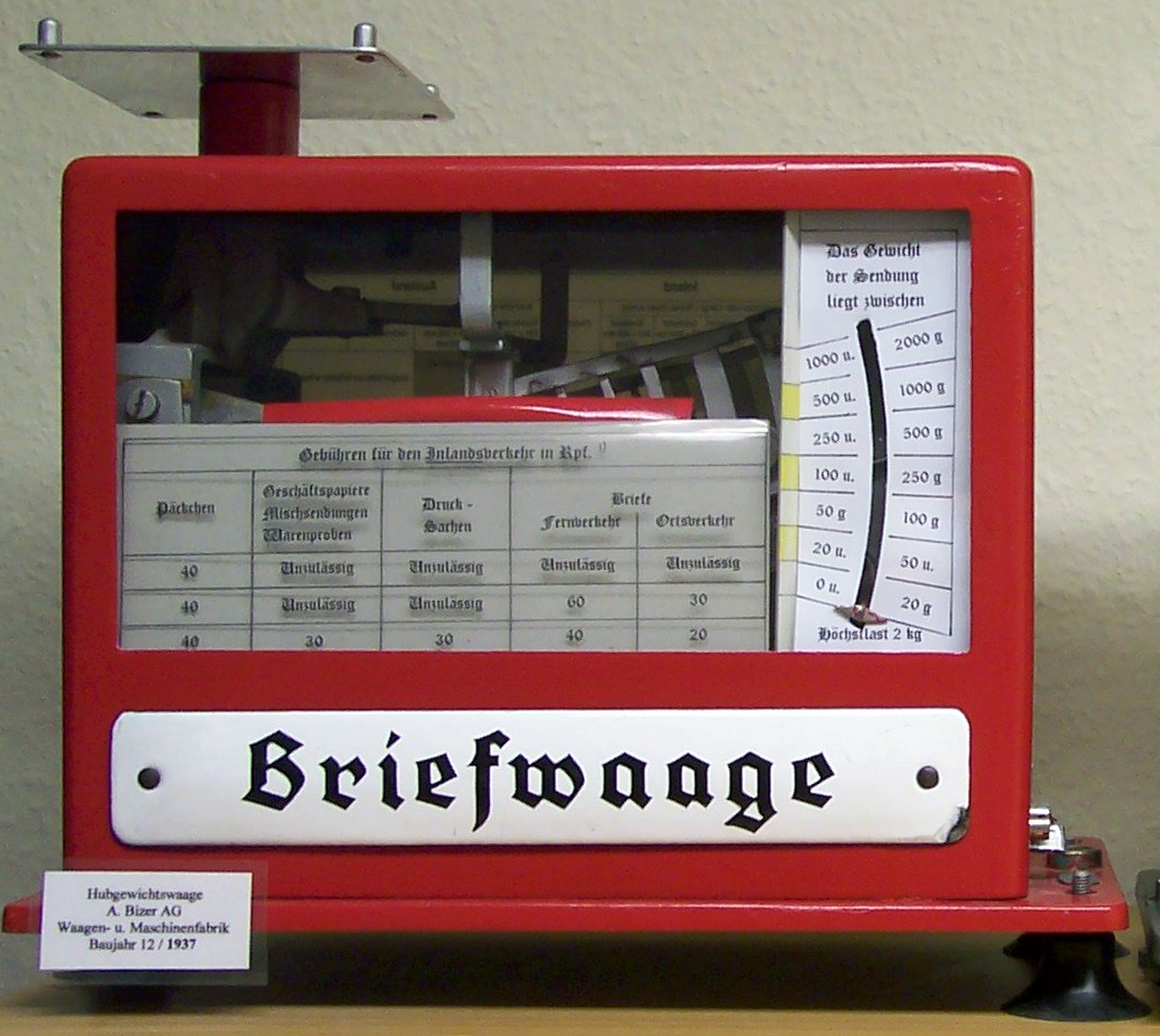 Hubgewichtsbriefwaage: Aus der Zeit des III. Reiches (da rot) Postmuseum in Erbes-Büdesheim